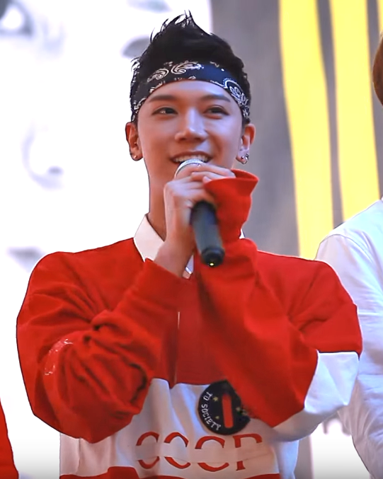 2016년 5월 1일 NCT U 팬사인회에서 텐.